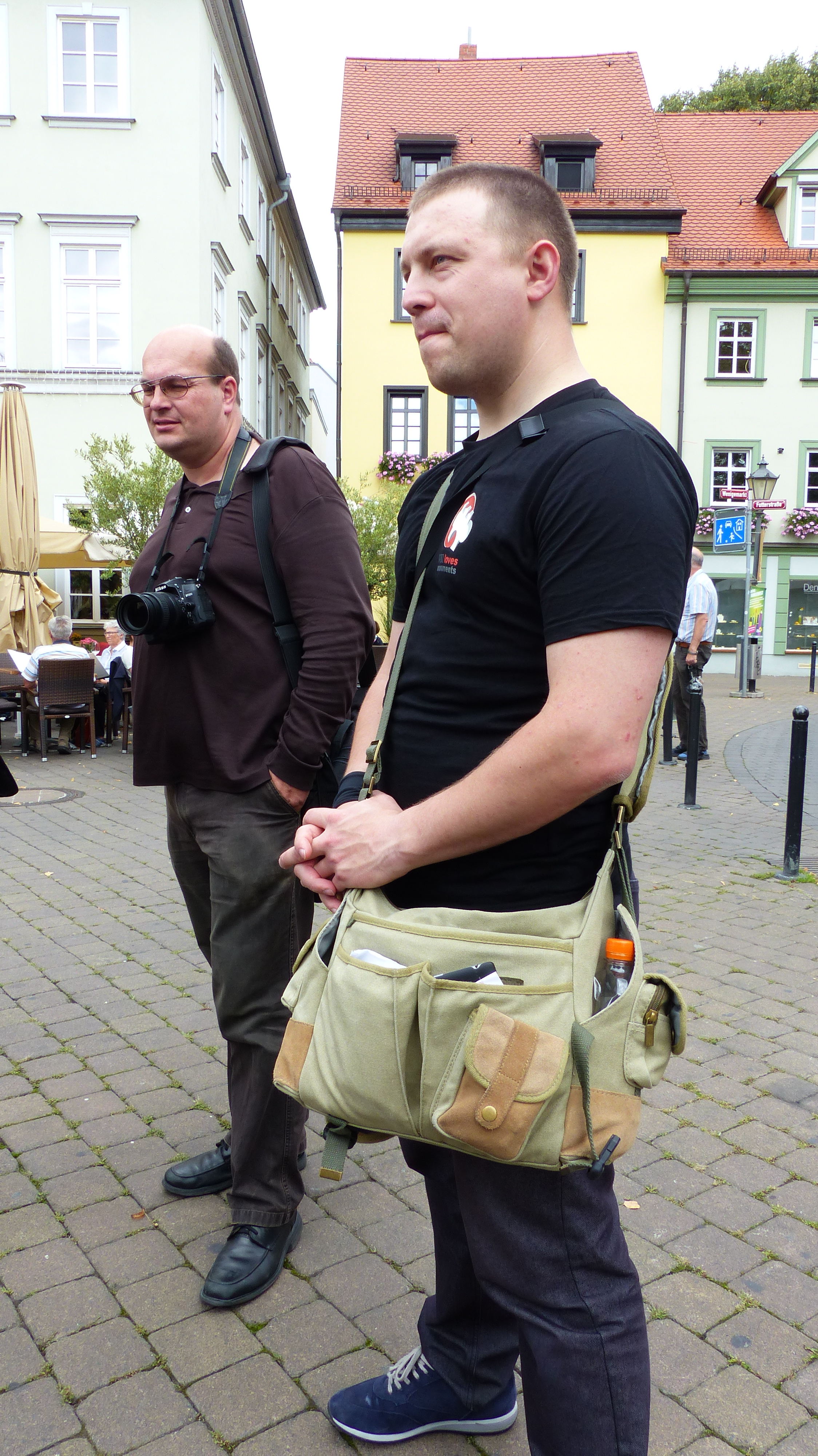 Auftakt zu Wiki Loves Monuments 2014 - Fototour in Erfurt 29.-31. August 2014